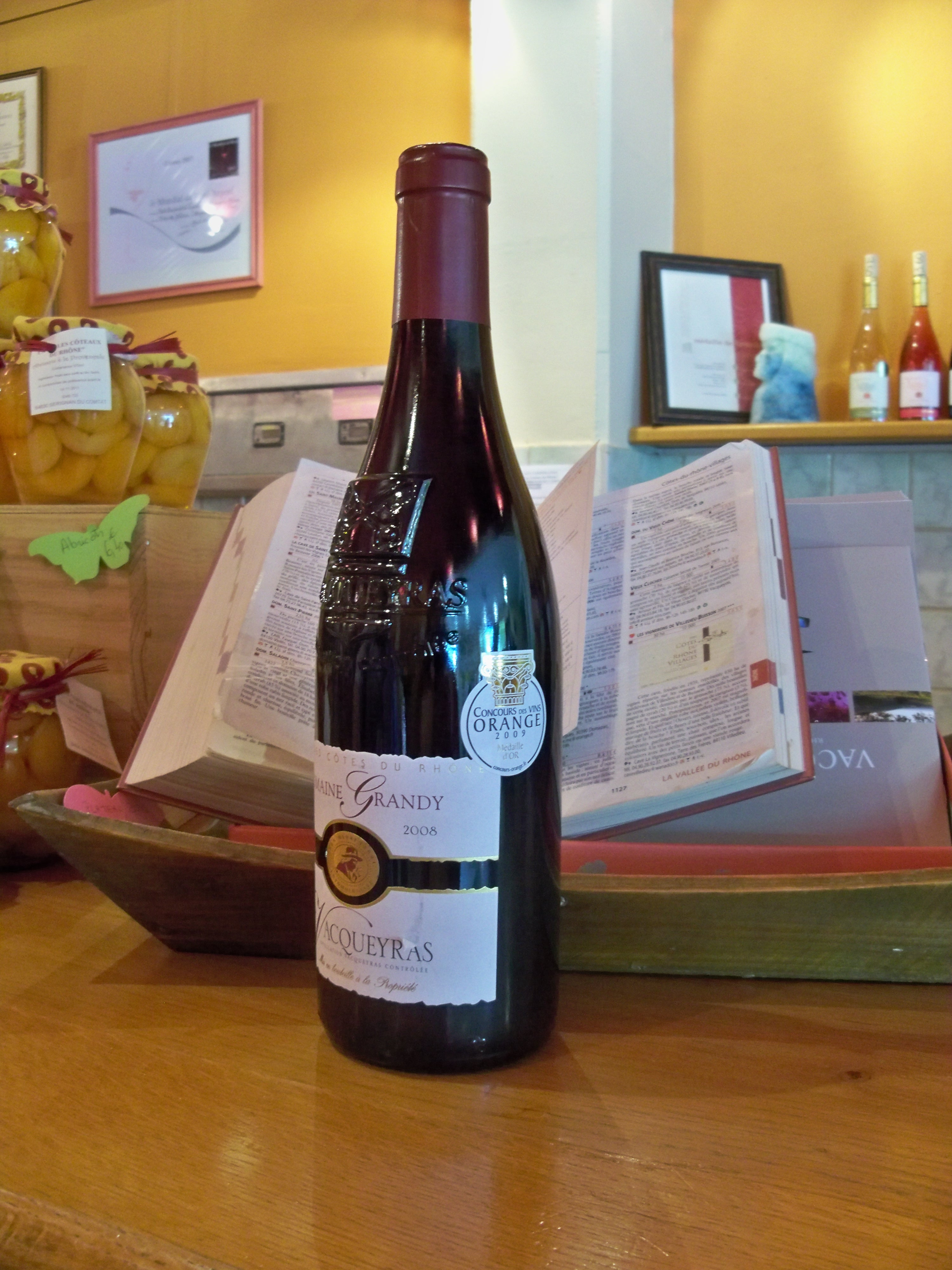 AOC Vacqueyras médaillés au concours des Vins d'Orange